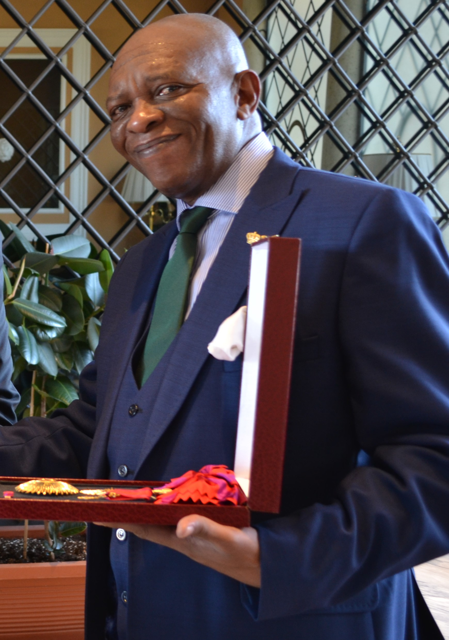 ルワンダ王位請求者「ユヒ6世」。